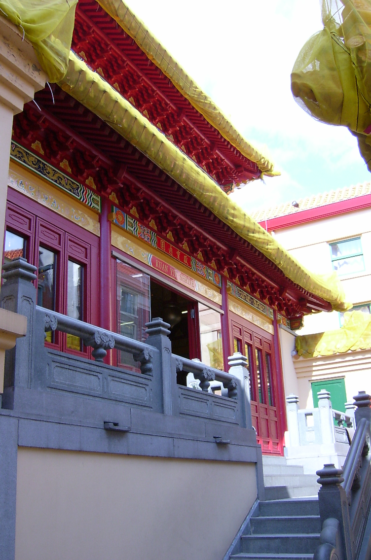 Eigenwerk: PD